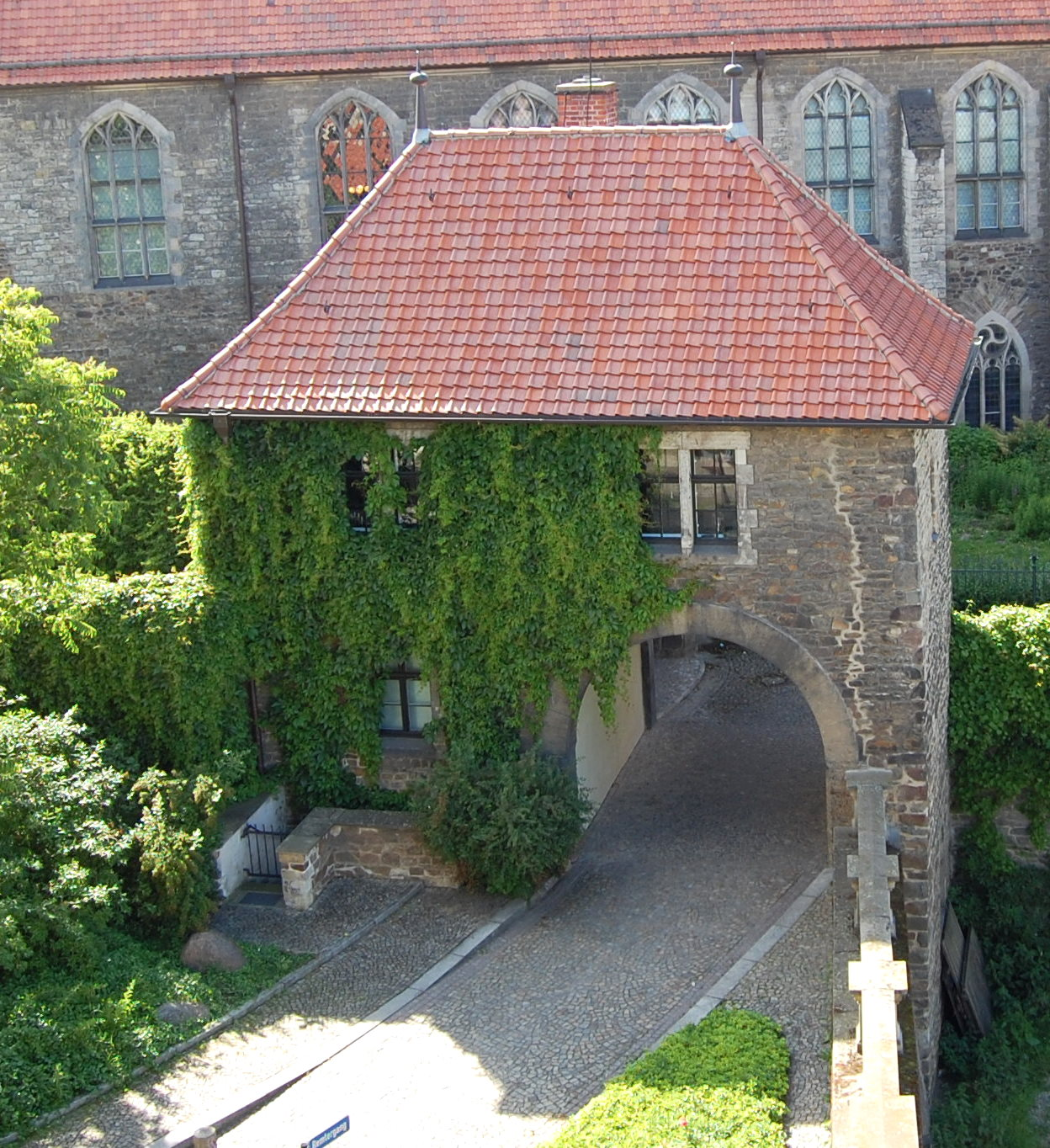 Tatarenturm in Magdeburg